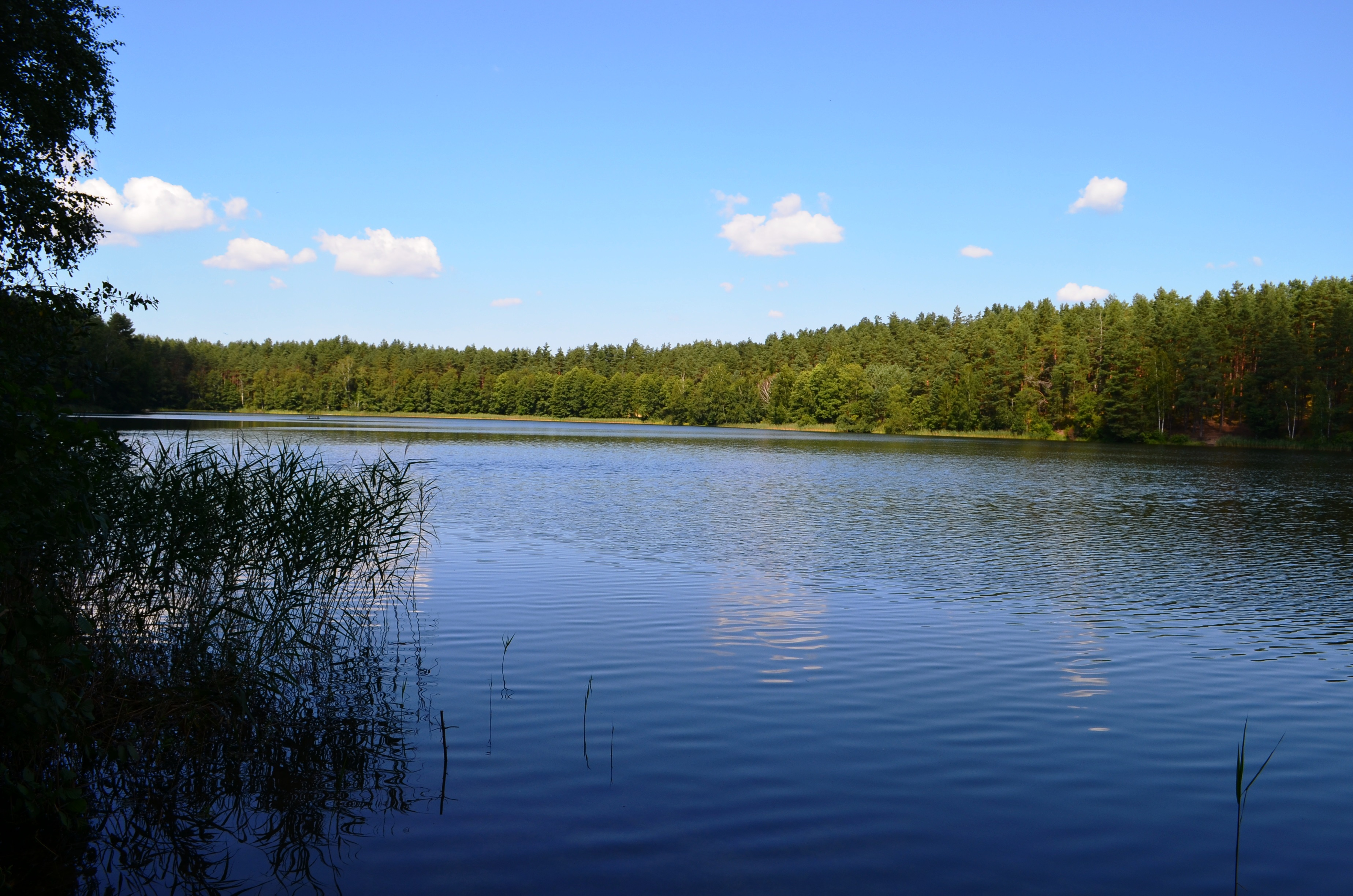 Mekšrinis, Dzūkijos NP, Varėnos raj.